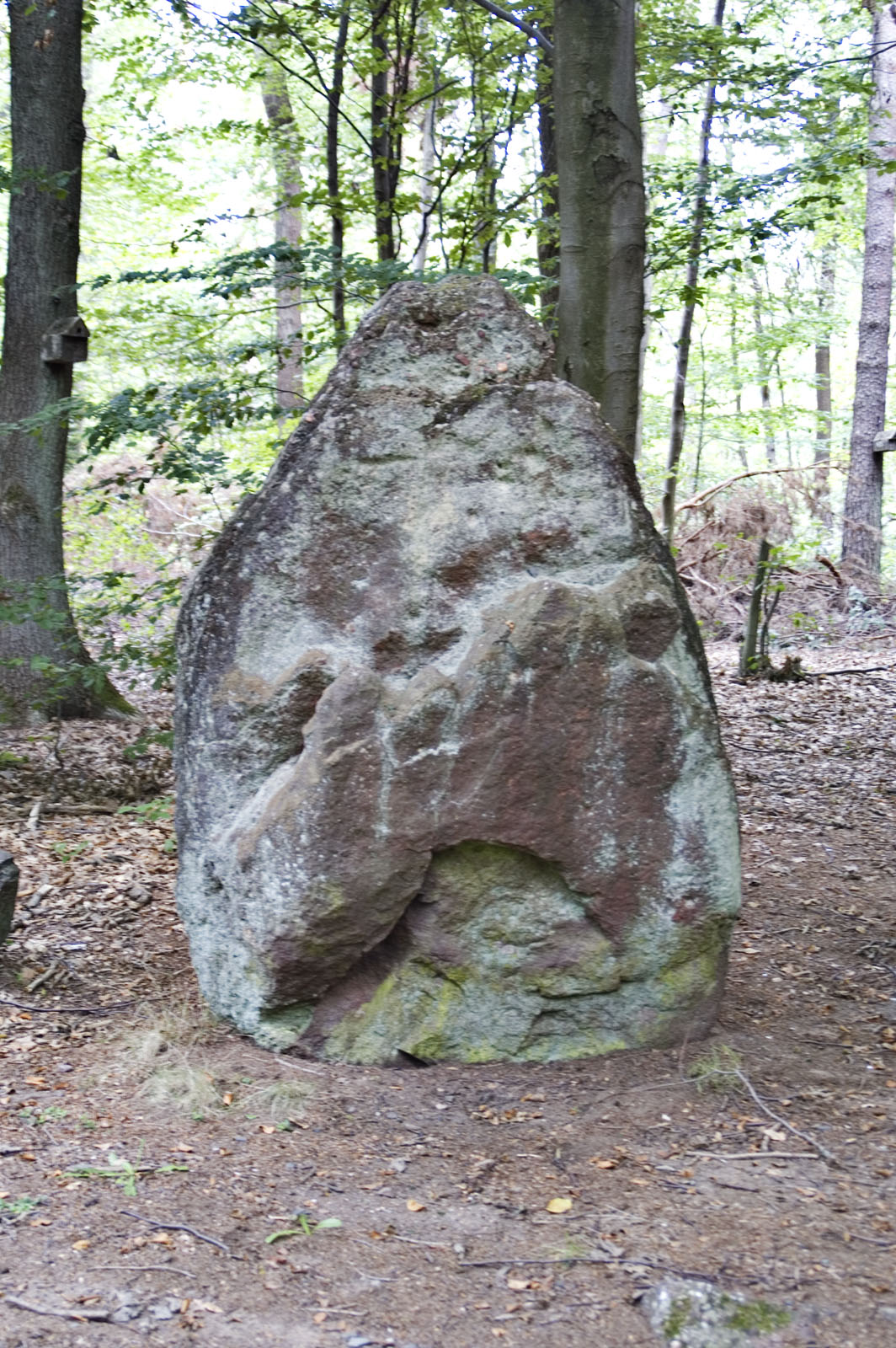 an der Grenze mit Höringen und Heiligenmoschel: Menhir, jungsteinzeitlich